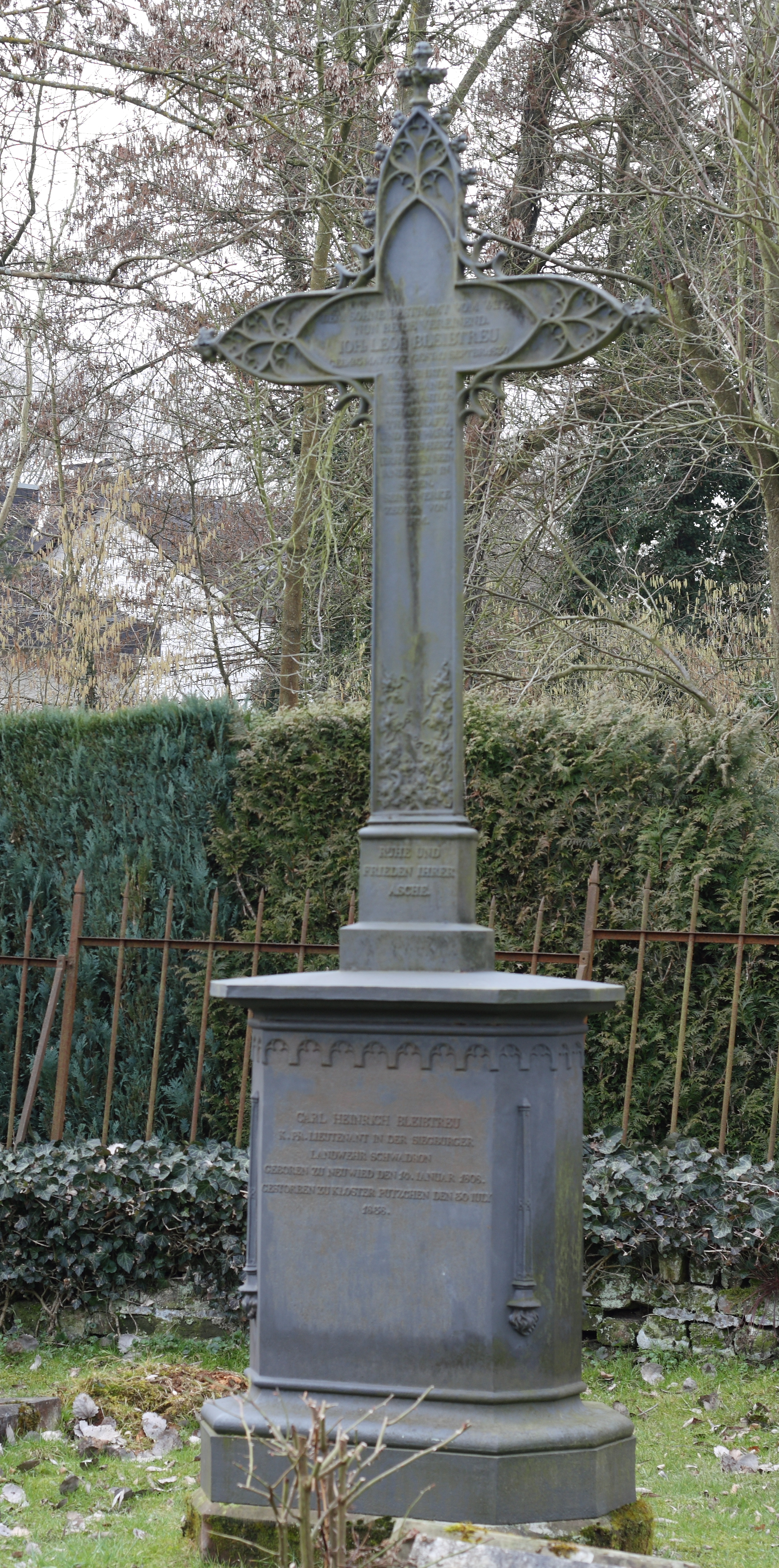 Gusseisernes Kreuz zum Gedenken an Carl Bleibtreu und seinen Vater Leopold Bleibtreu in Holzlar, einem Ortsteil von Bonn, siehe Rudolf Cramer: Der Evangelische Friedhof in Holzlar. (Studien zur Heimatgeschichte des Stadtbezirks Bonn-Beuel) Bonn 2008, ISBN 978-3-922832-42-3